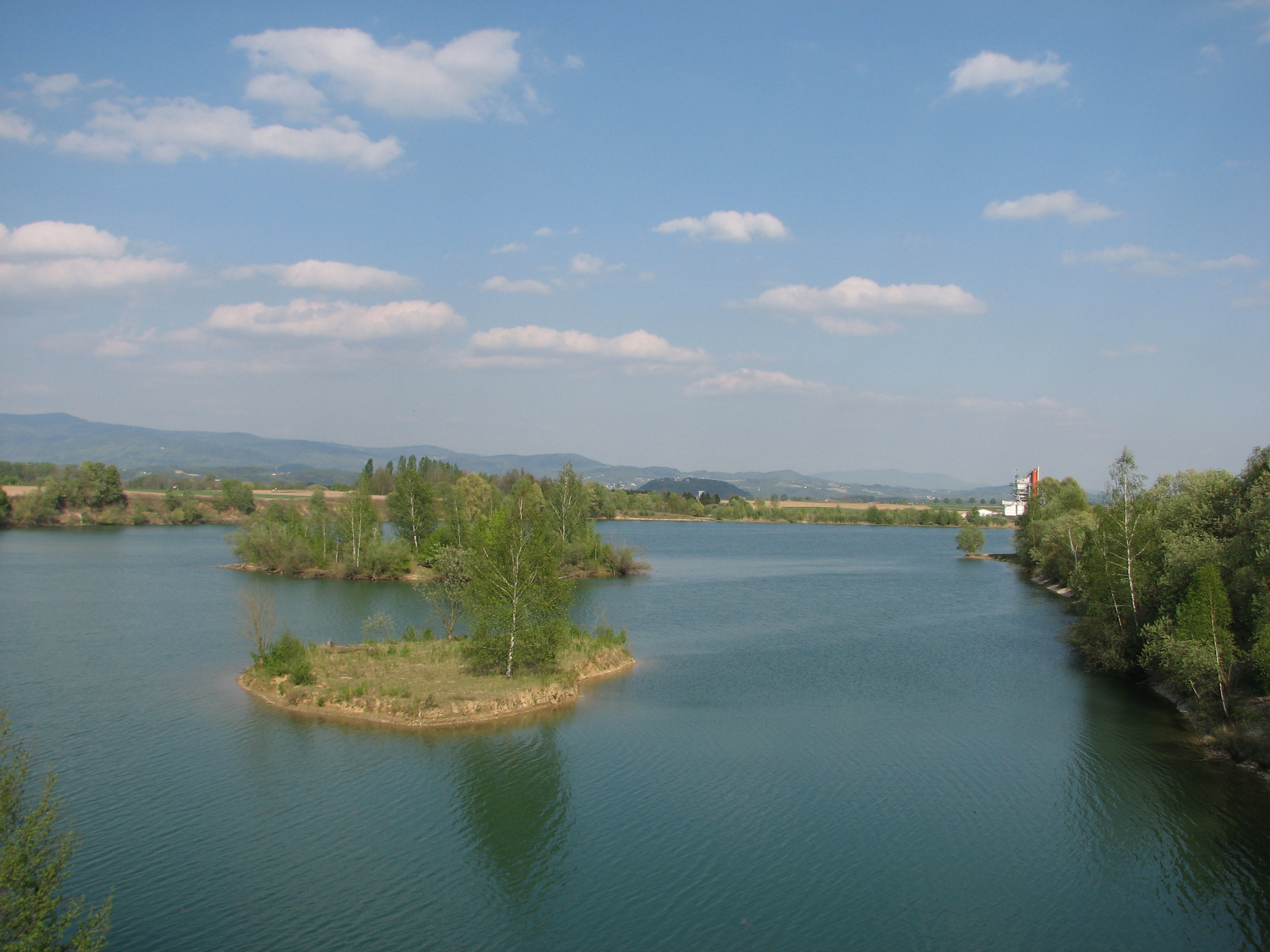 Der Fehmbacher Weiher bei Uttenkofen im Landkreis Deggendorf (Niederbayern)